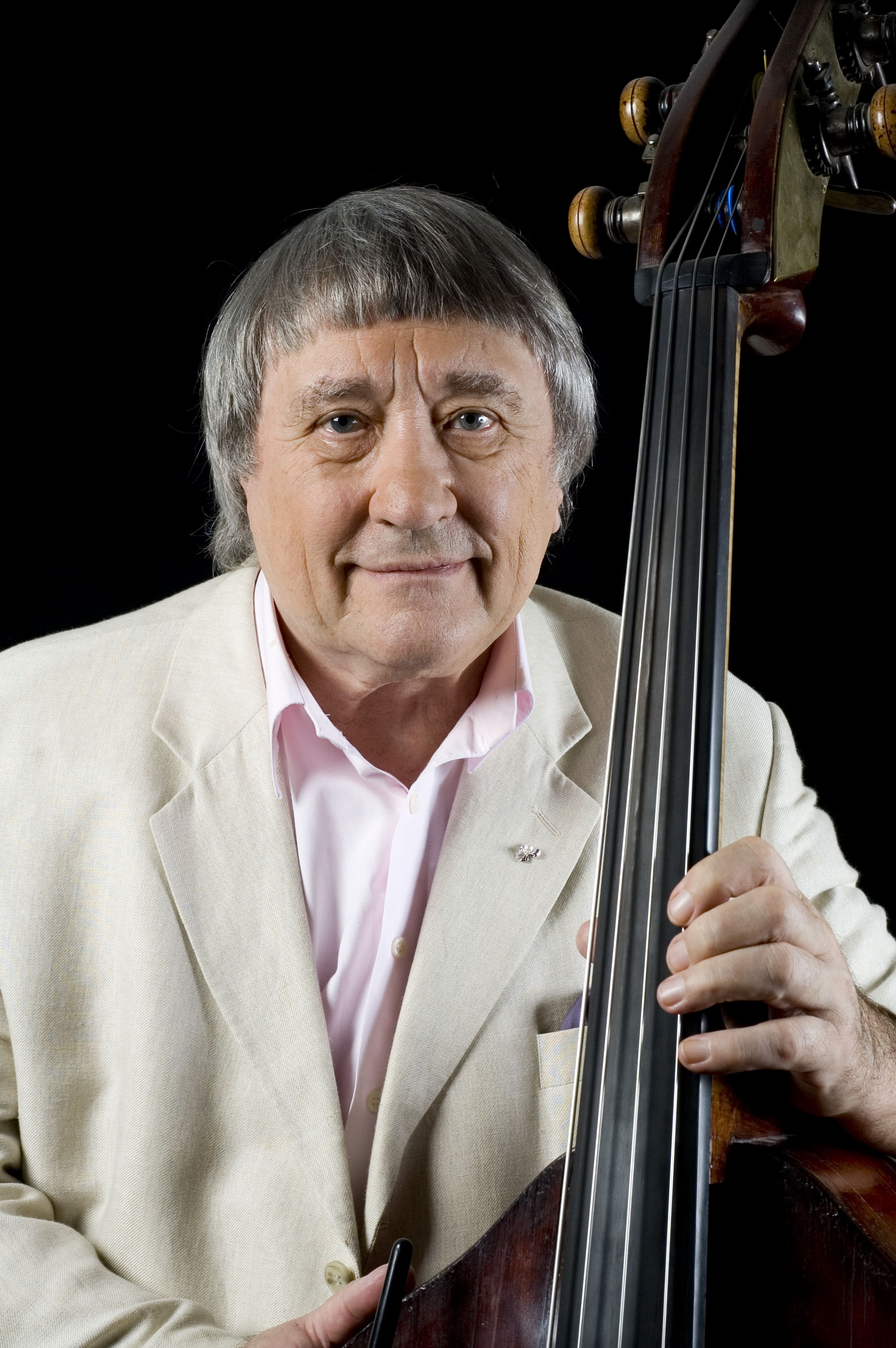 Friedrich Witt (*31.1.1930), Berliner Philharmoniker a.d. Fotograf: Thomas Witt Quell-URL